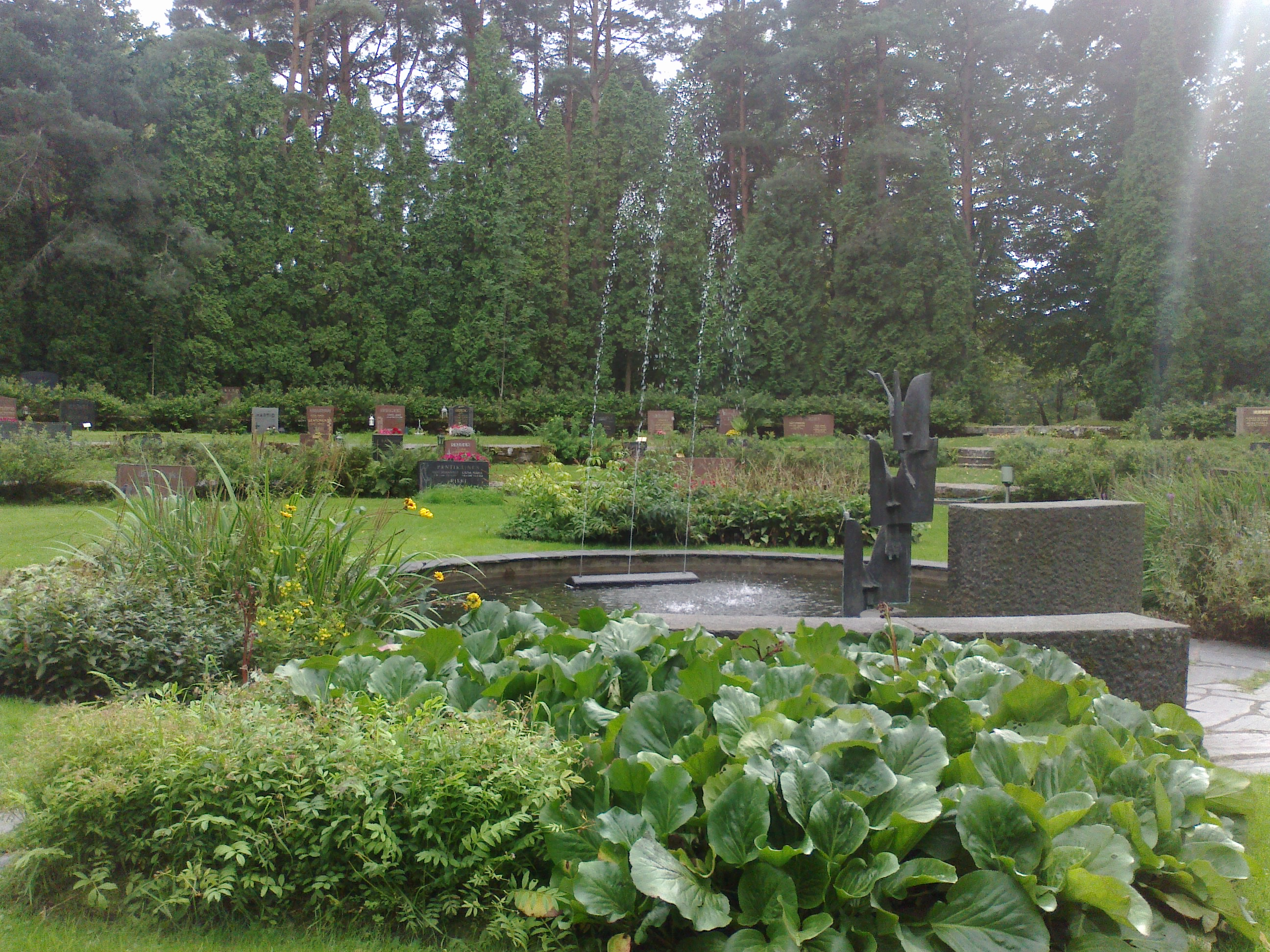 Malmin hautausmaa Helsingissä.